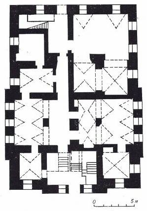 План Дома масонаў